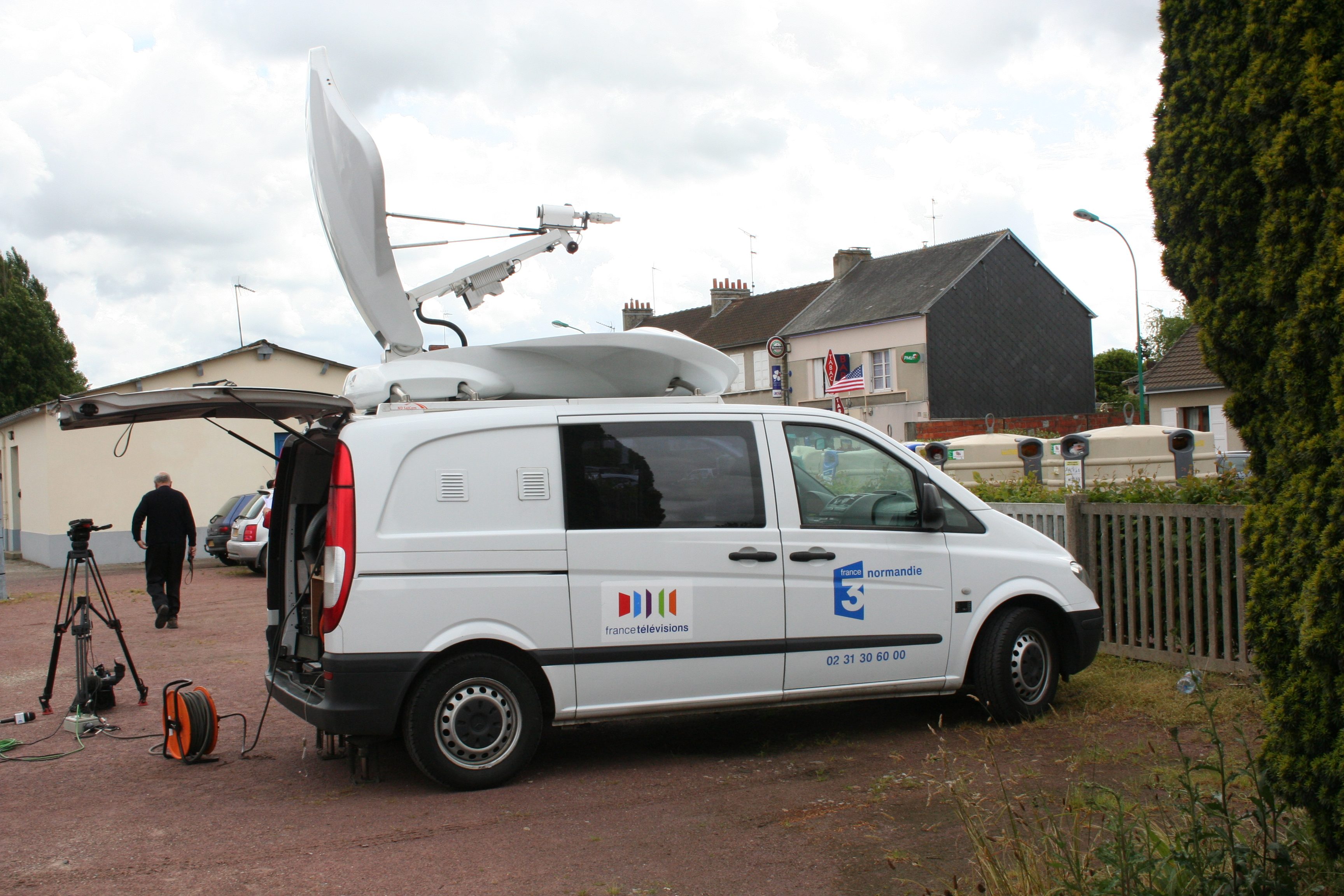 Véhicule Stallite de France 3 Normandie